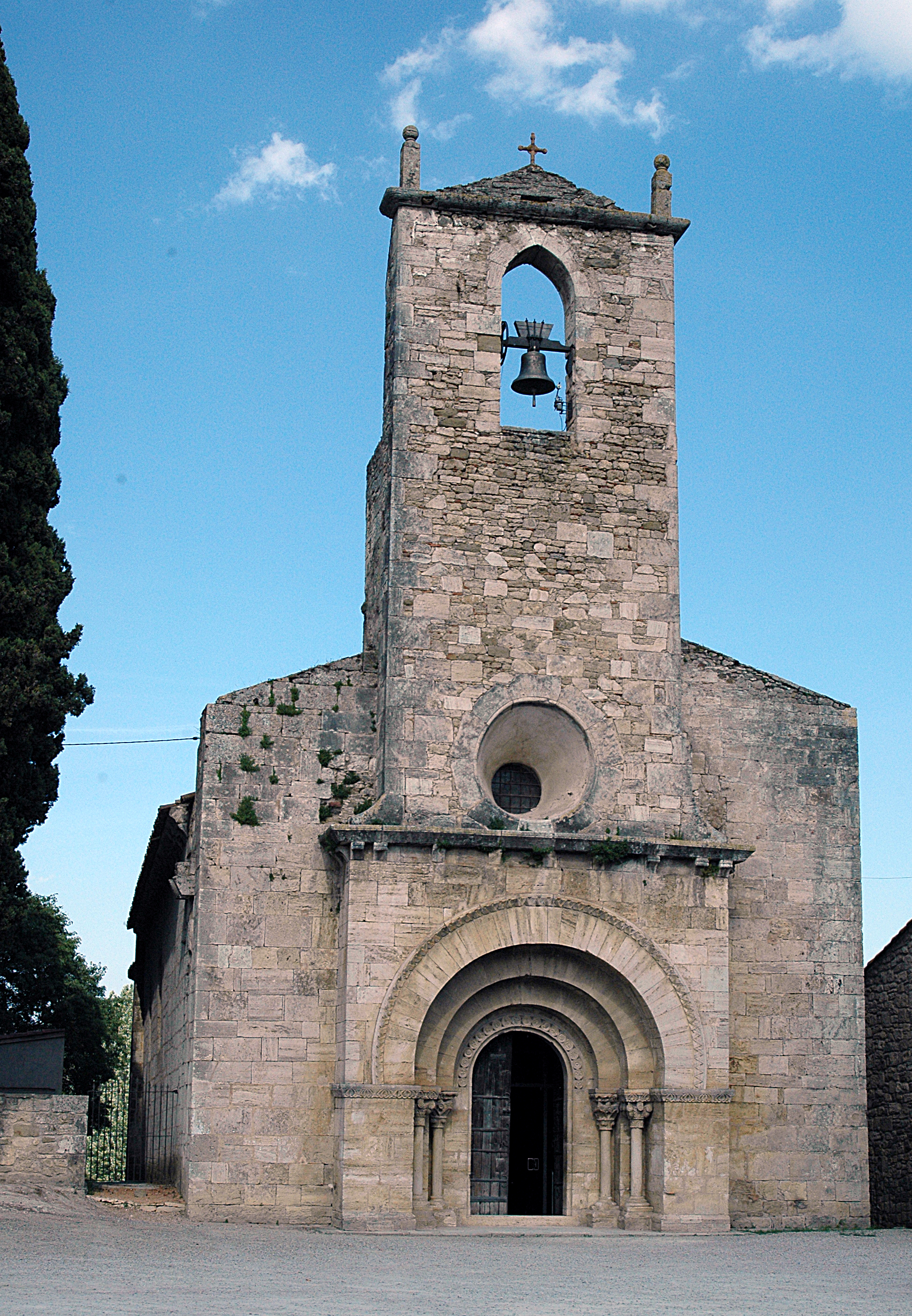 Església de Santa Maria (Porqueres)